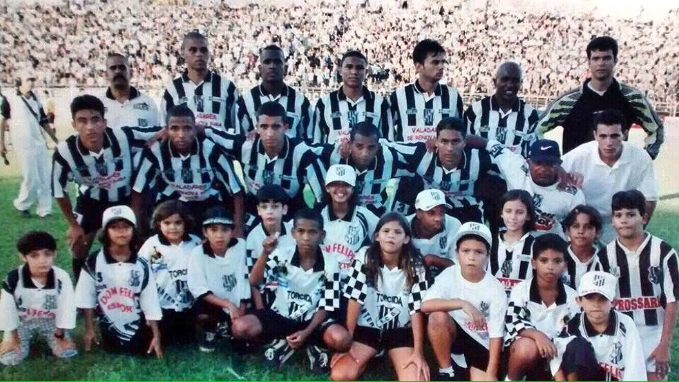 Ricardinho em partida oficial pelo Democrata de Minas Gerais.